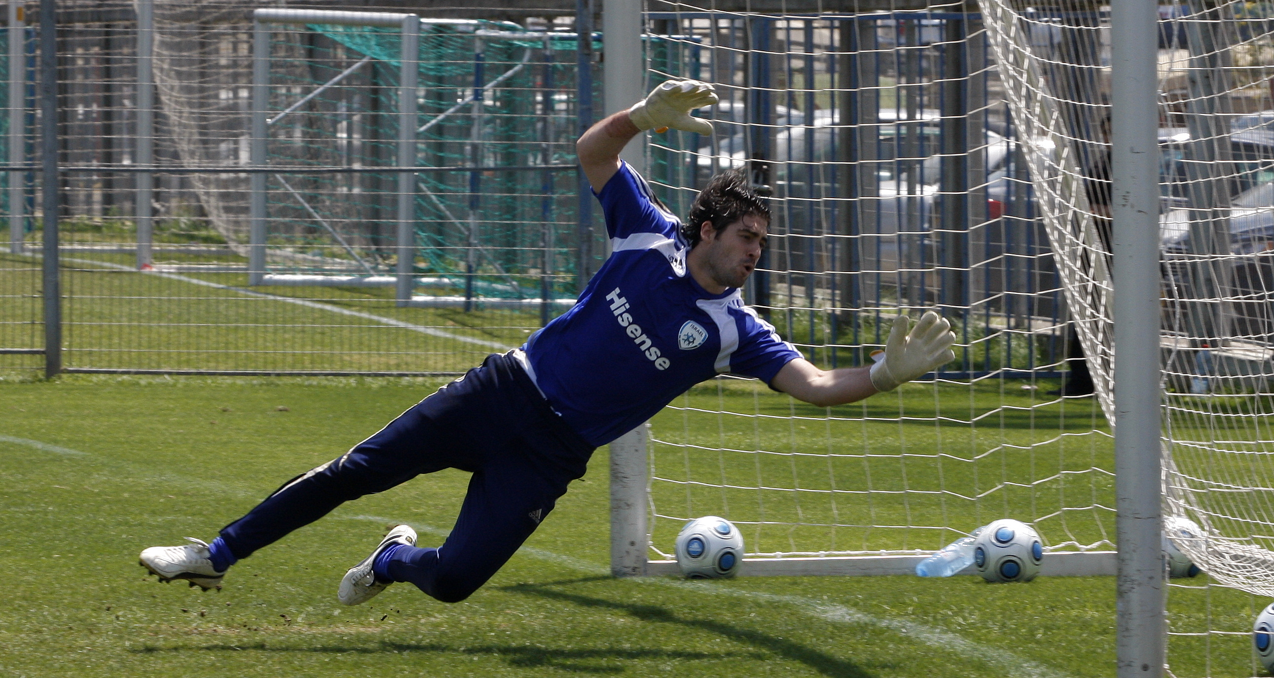 שוער הכדורגל אוהד לויטה